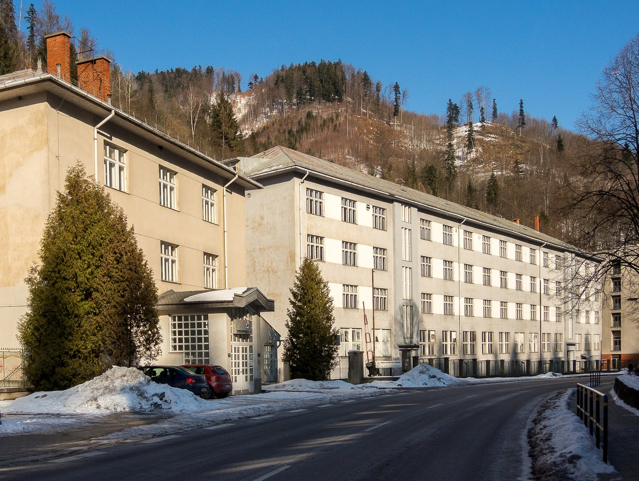 Bývalé budovy Vojenského kartografického ústavu Harmanec: administratíva (vľavo) a tlačiareň.